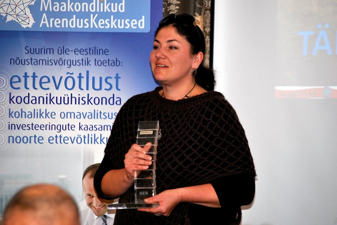 Maria Kaljuste vastu võtmas SEB panga ettevõtlusauhinda "Parim startija Saaremaal 2015"